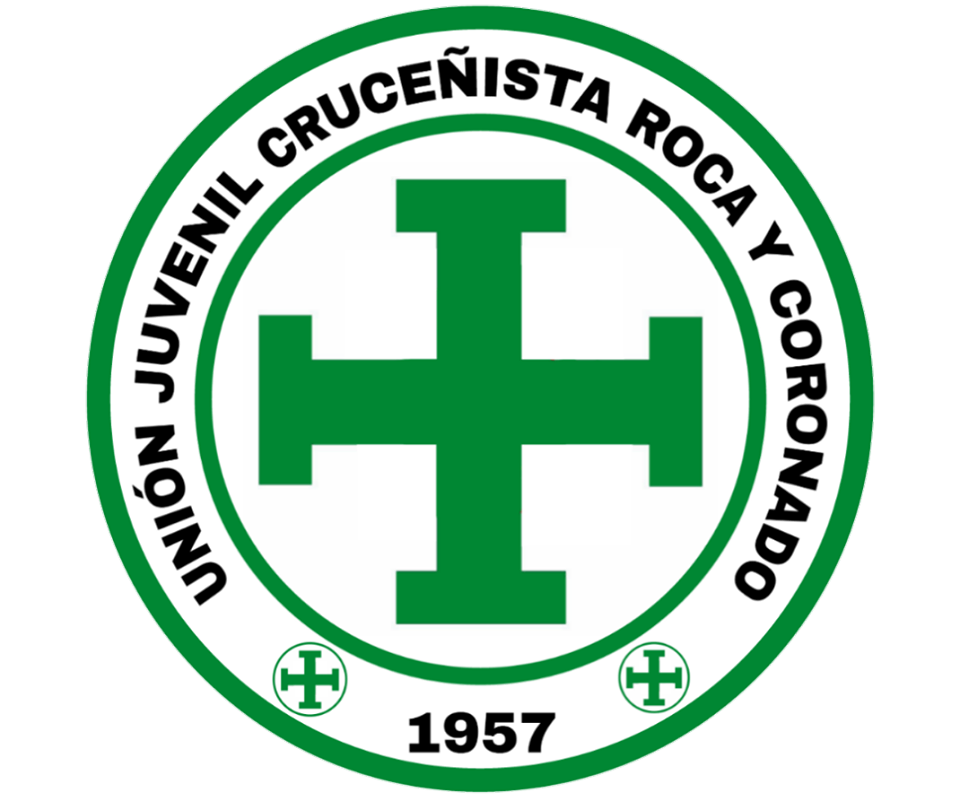 Escudo de Color verde y blanco